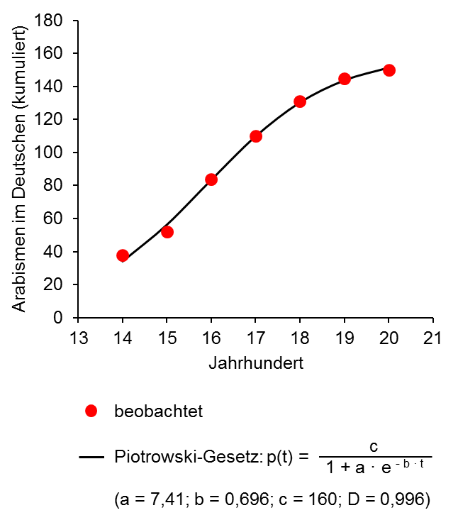 Kumulierte Anzahl der Arabismen im Deutschen über die Jahrhunderte und Anpassung mit dem Piotrowski-Gesetz (c ist der Grenzwert, gegen den der Prozess strebt; a und b sind weitere Parameter; t ist die Zeit). Erstellt aus den Daten von Karl-Heinz Best (Zur Ausbreitung von Wörtern arabischer Herkunft im Deutschen. In: Glottometrics 8, 2004, S. 75–78), wiedergegeben im Wikipedia-Artikel "Sprachwandelgesetz" in der Version vom 13.09.2014